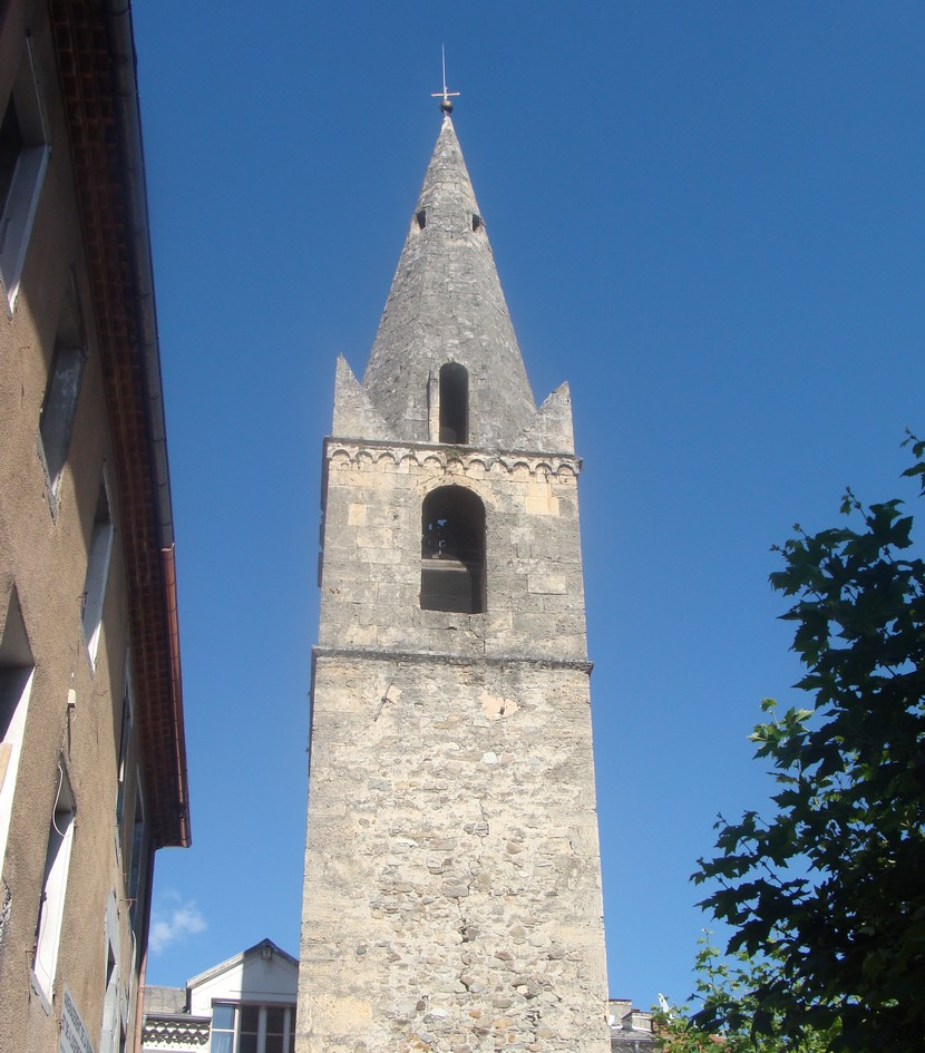 Le clocher Saint-Pierre, à Remollon (Hautes-Alpes)